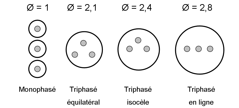 Position des différentes phases dans un GIS